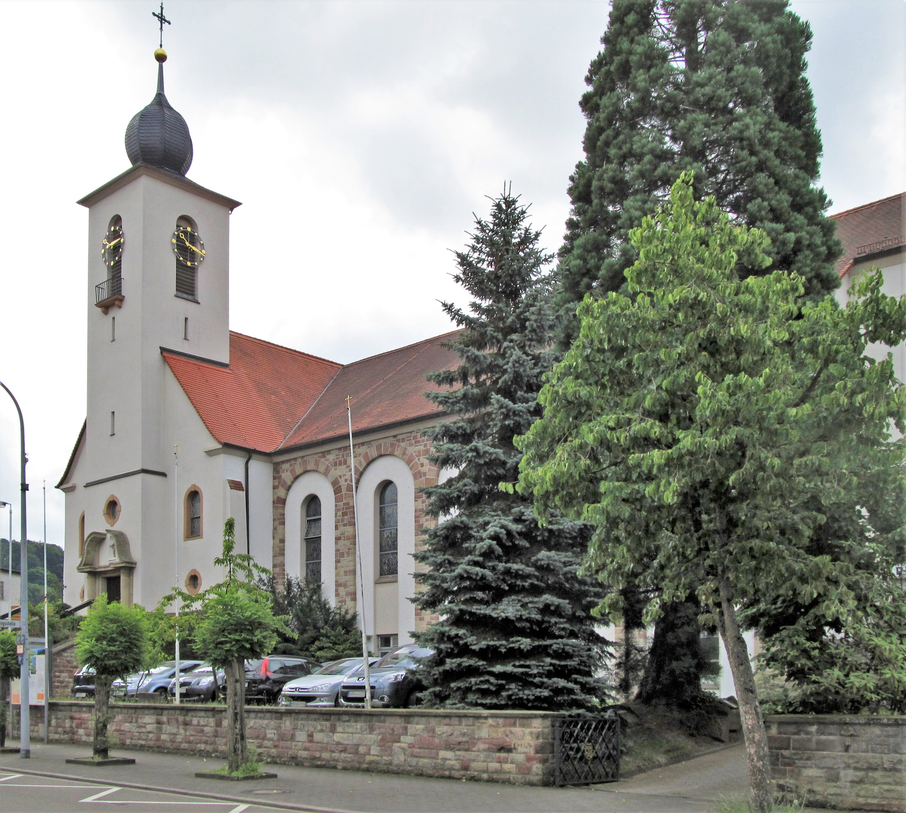 Die katholische Pfarrkirche Herz Jesu in Oberwürzbach, einem Stadtteil von St. Ingbert, Saarland